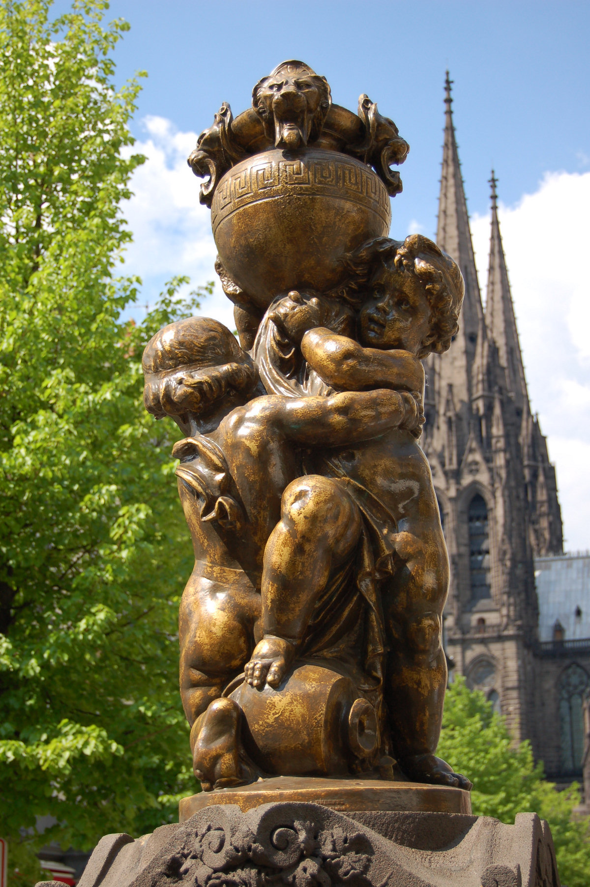 Détail de la fontaine Saint-Genés sur la place Royale, à Clermont-Ferrand (Puy-de-Dôme, France).